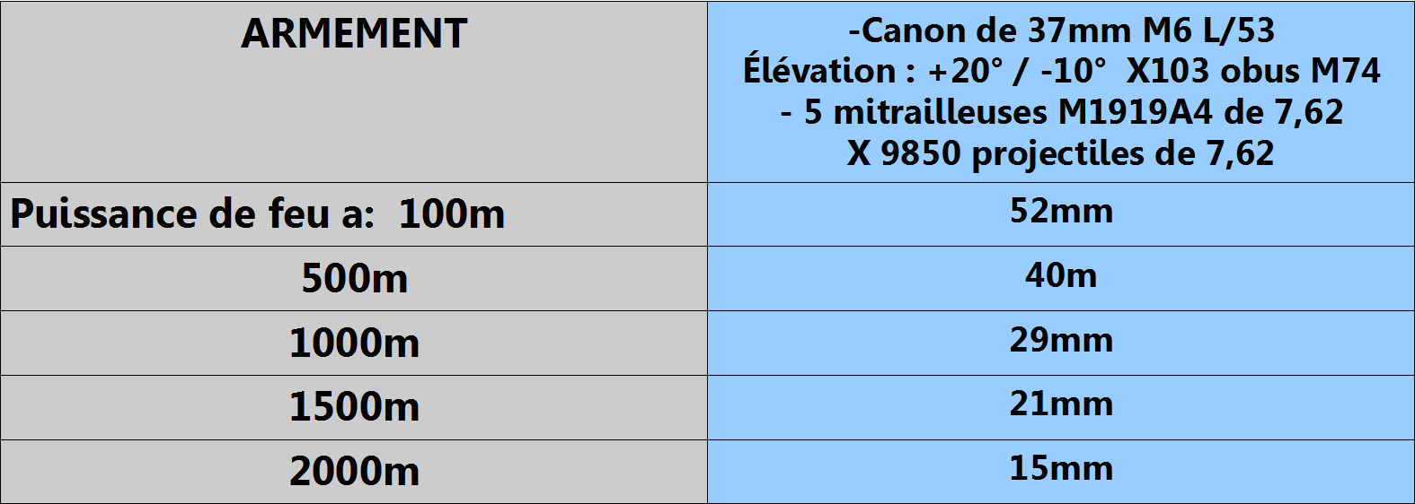 Puissance de Feu du M3 Stuart jusqu’à 2000m